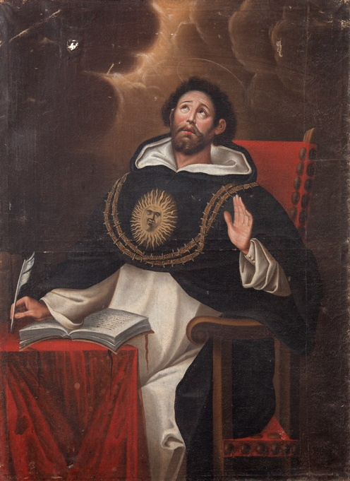 La obra representa al insigne teólogo y religioso dominico Santo Tomás de Aquino.